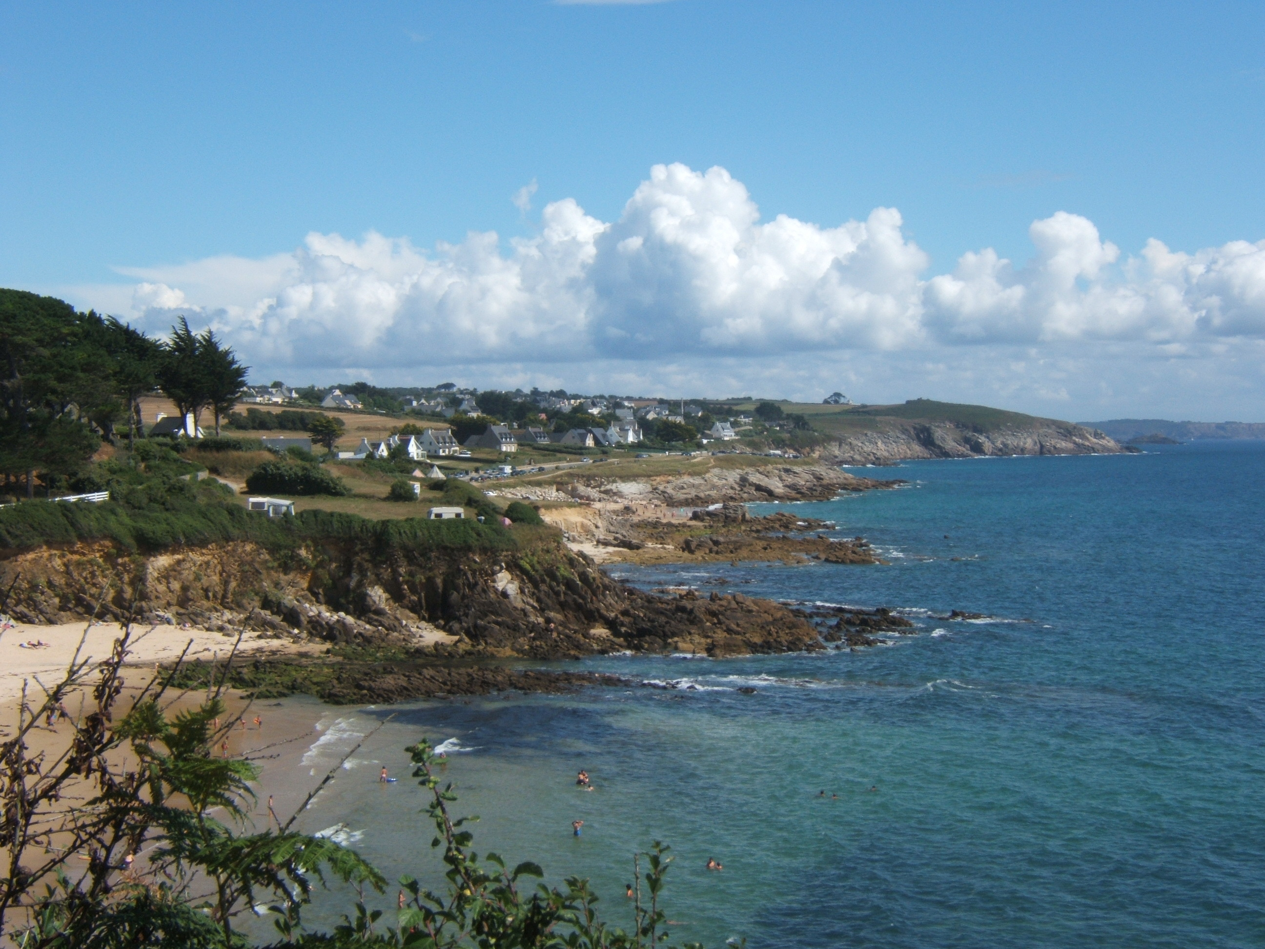 La plage de Porsmilin entre les communes de Plougonvelin et de Locmaria-Plouzané entre Brest et la Pointe Saint-Mathieu.